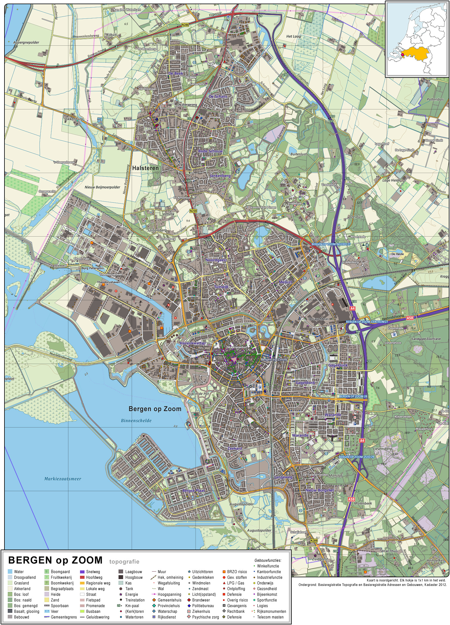 Topografisch beeld van de stad Bergen op Zoom. Op basis van de GML open geodata van de BRT/Top10NL (basisregistratie Topografie, Kadaster 2012), vrijgegeven door Kadaster op 30-11-2012 onder de Creative Commons BY licentie. Gebouwvlakken vanuit Open Geodata BAG extract (december 2012). Samenstelling en kleurenschema: Jan-Willem van Aalst, met QuantumGIS en Photoshop.